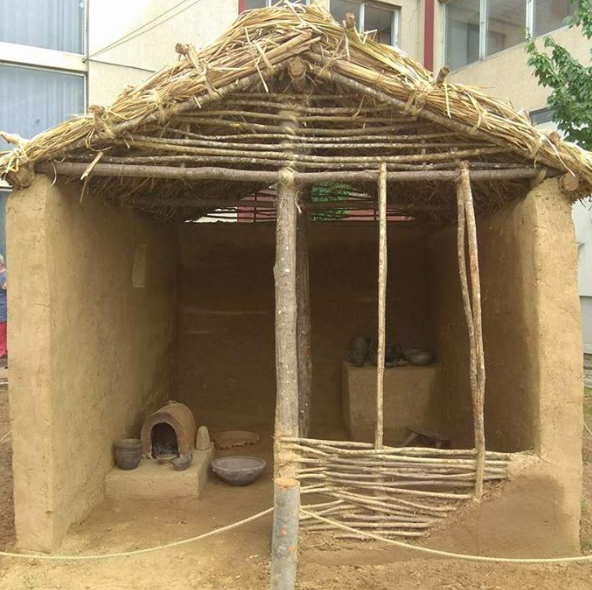 Srpski (latinica): Rekonstrukcija kuće iz poznog bronzanog doba sa lokaliteta Hisar.